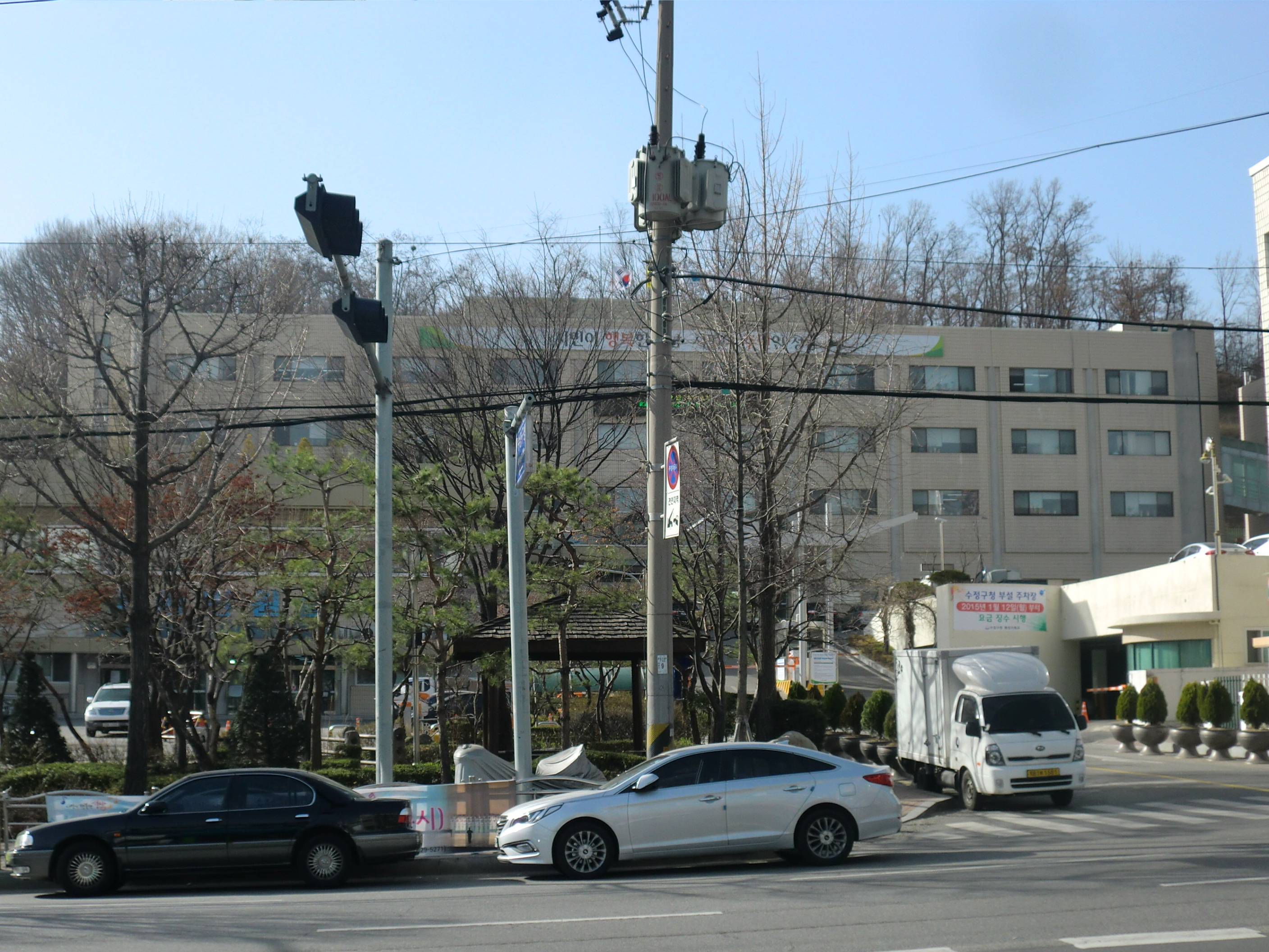 경기도 성남시에 있는 수정구청